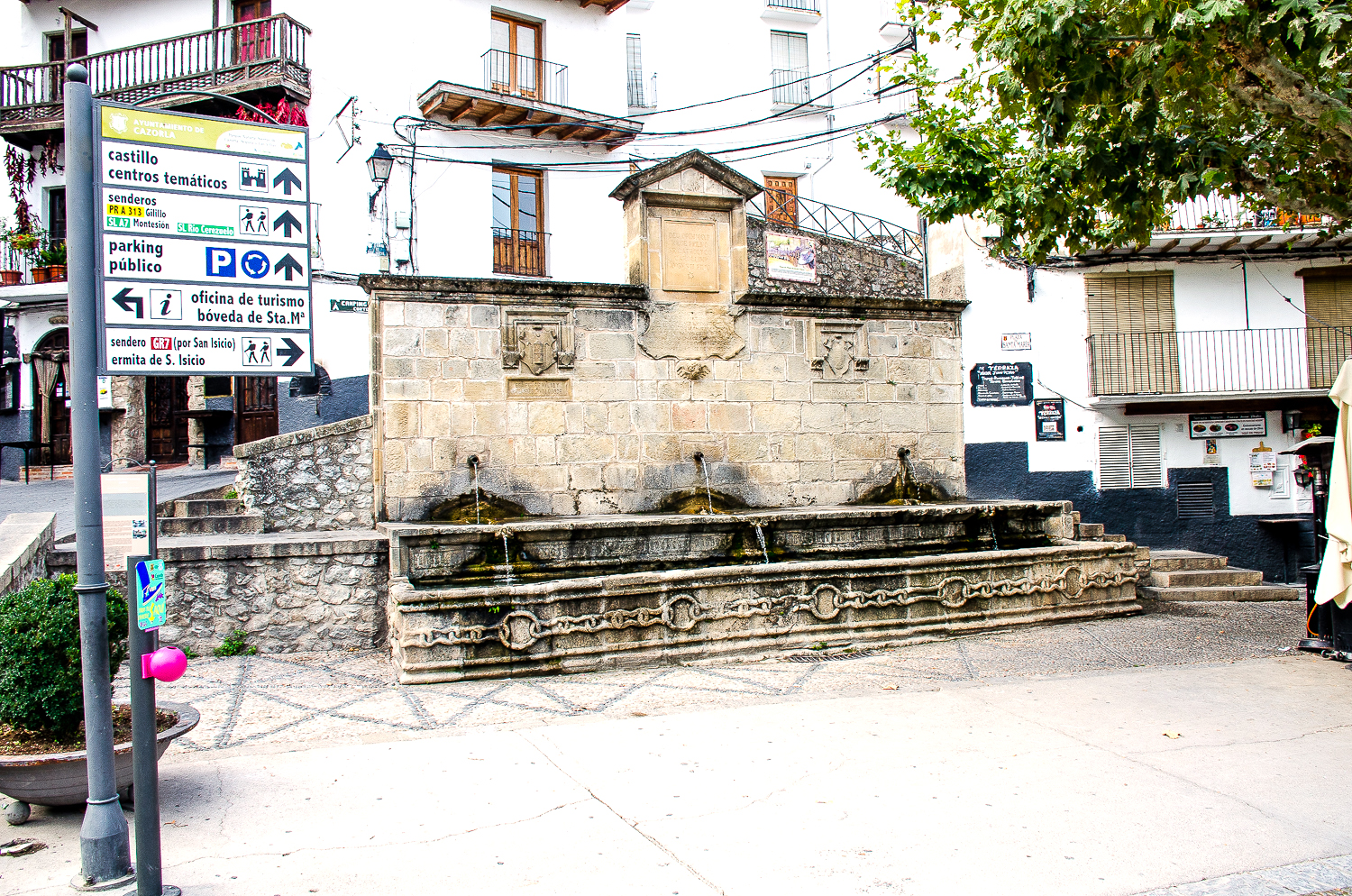 Fuente de las Cadenas de Cazorla. Tres caños. Estilo herreriano.